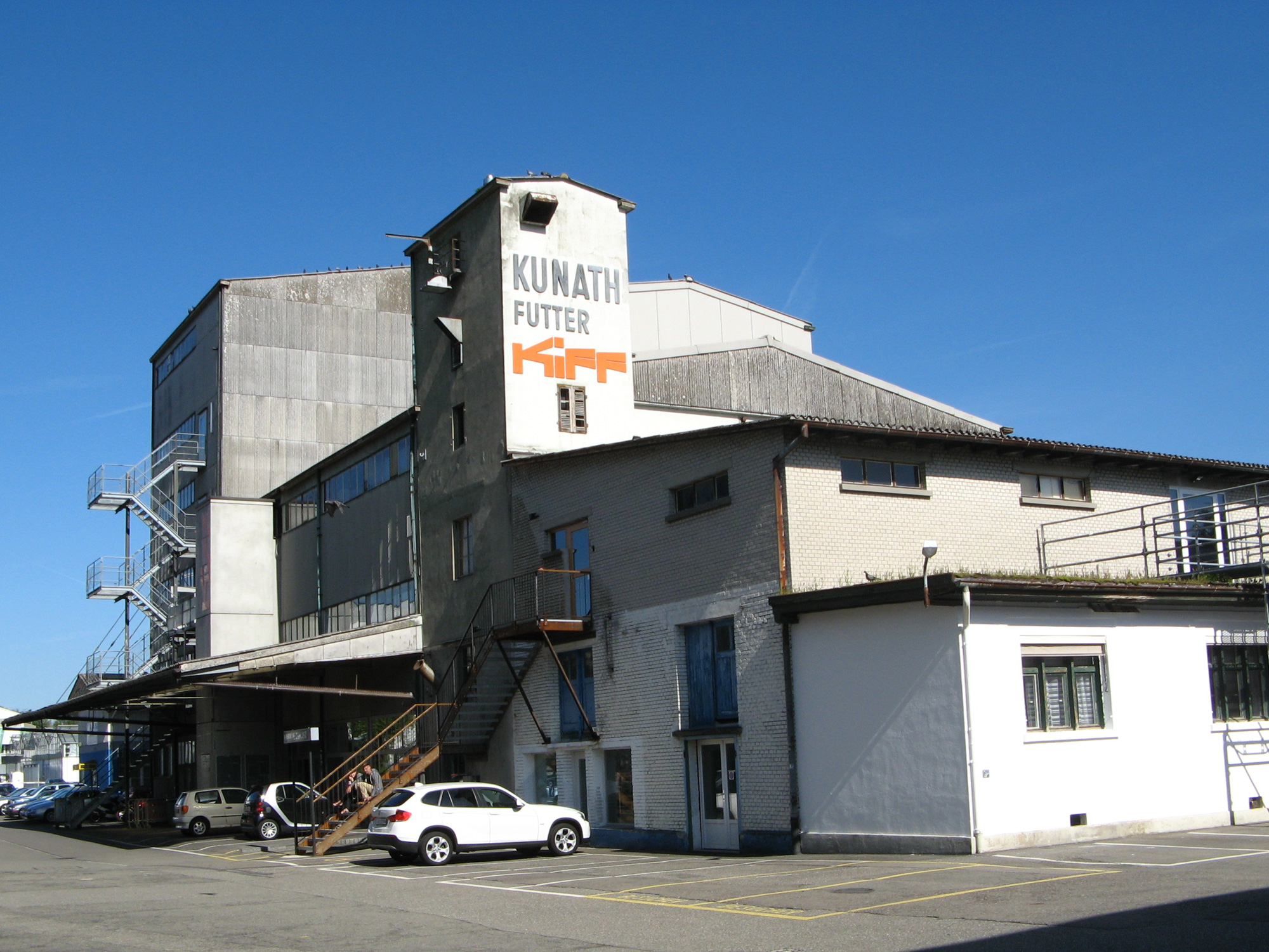 KiFF (Kultur in der Futterfabrik) in Aarau mit Fabrikpalast (im Vordergrund)